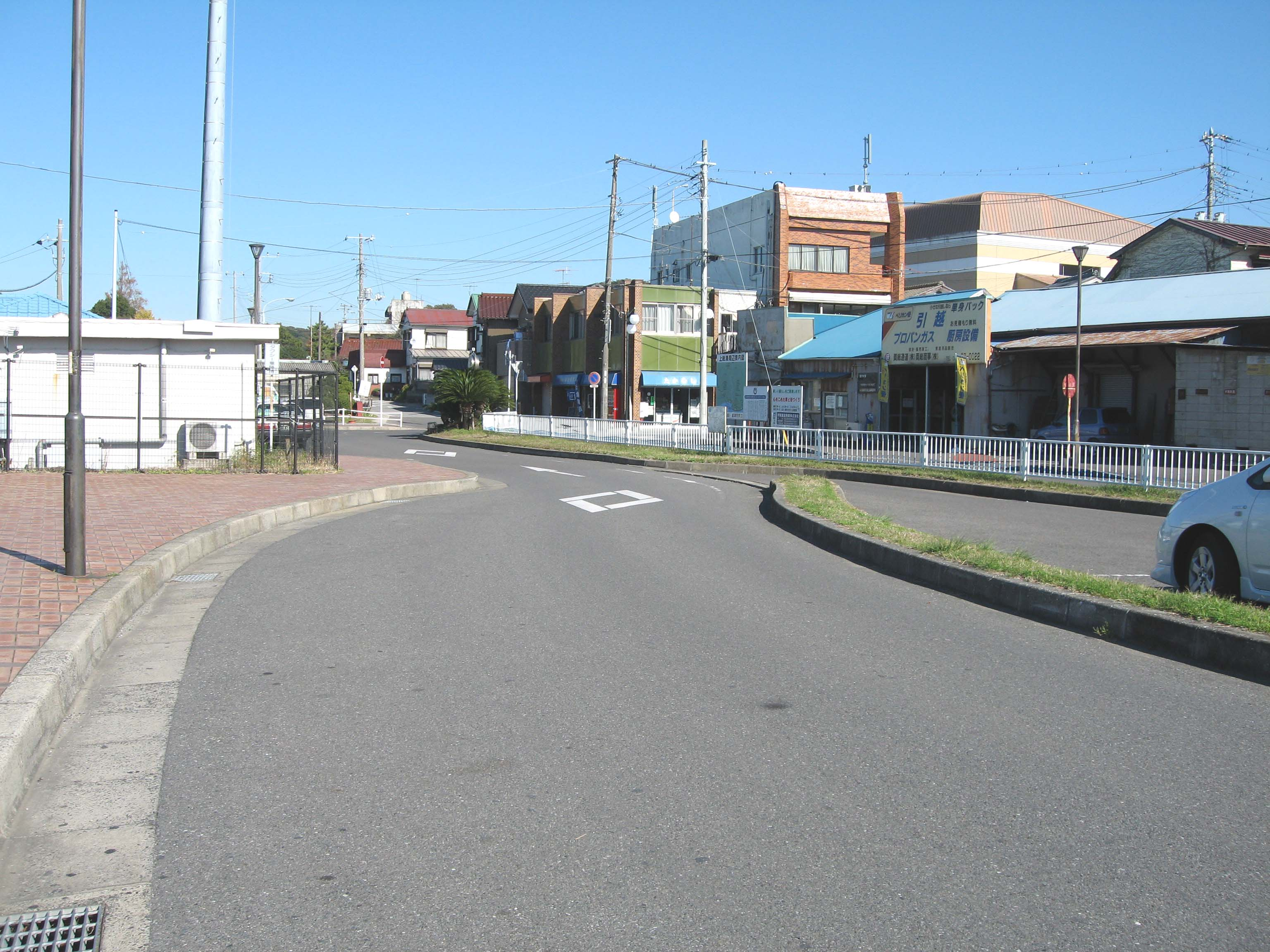 Kazusaminato station, Uchibo Line, Chiba, Japan, 上総湊駅ロータリー